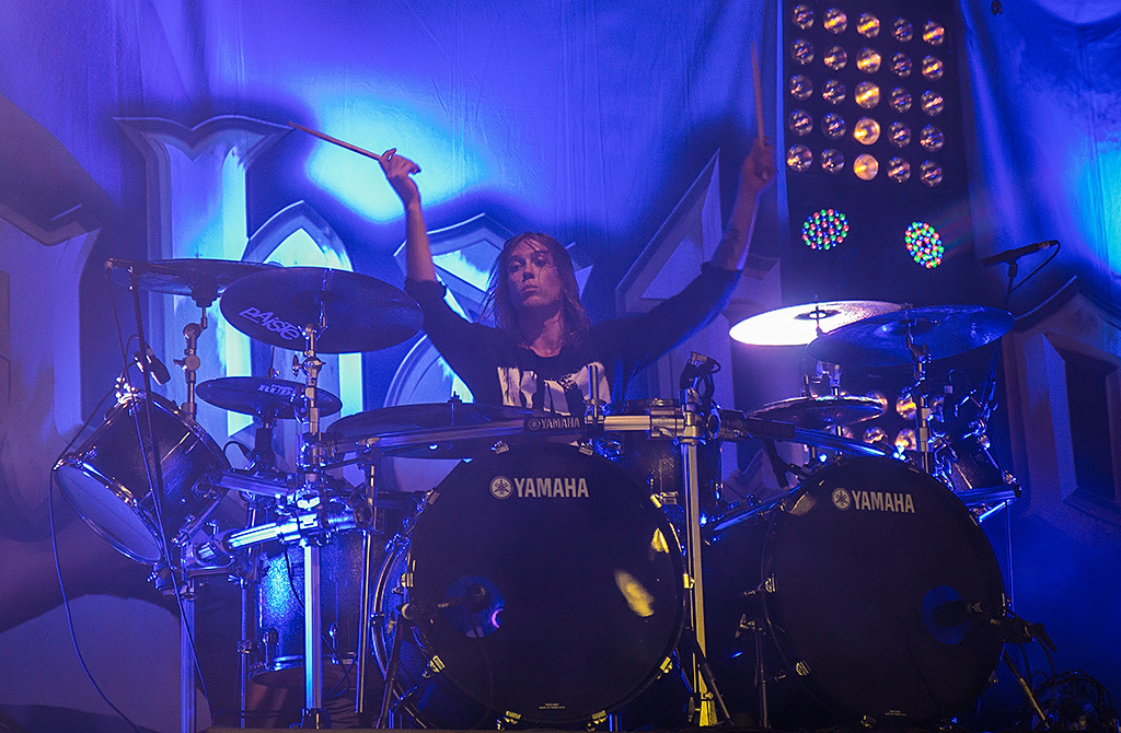 Sabaton 21.9.2012 Geiselwind, Eventhalle